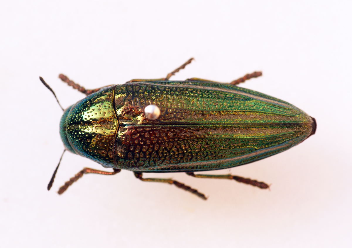 Buprestidae - In collection